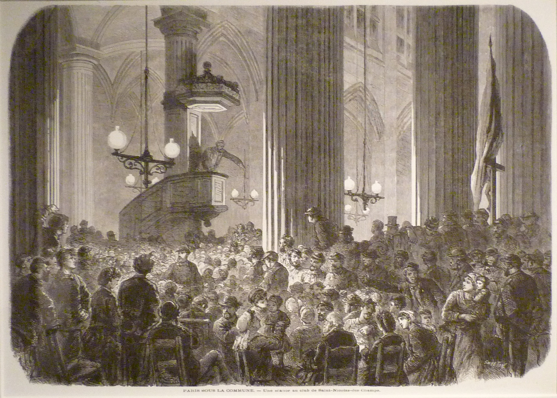 Exposition La Commune de Paris à l'Hôtel de Ville de Paris (18 mars - 28 mai 2011) - Un réunion du club de l'église Saint-¨Nicolas-des-Champs (3e arrond.) - Gravure de S. Melton pour L'Illustration du 20 avril 1871 - Bibliothèque historique de la Ville de Paris.